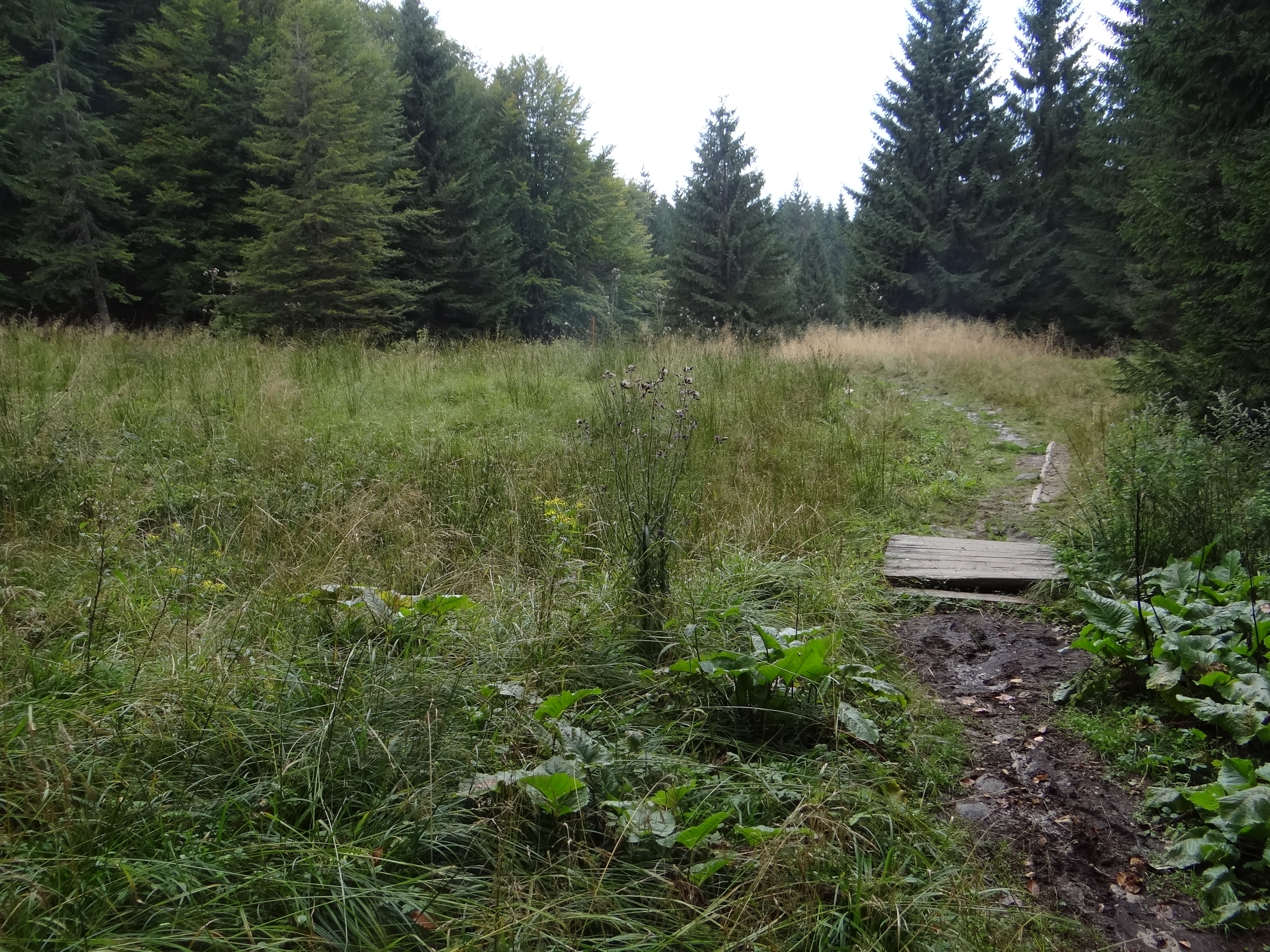 Czarna Hala w Babiogórskim Parku Narodowym